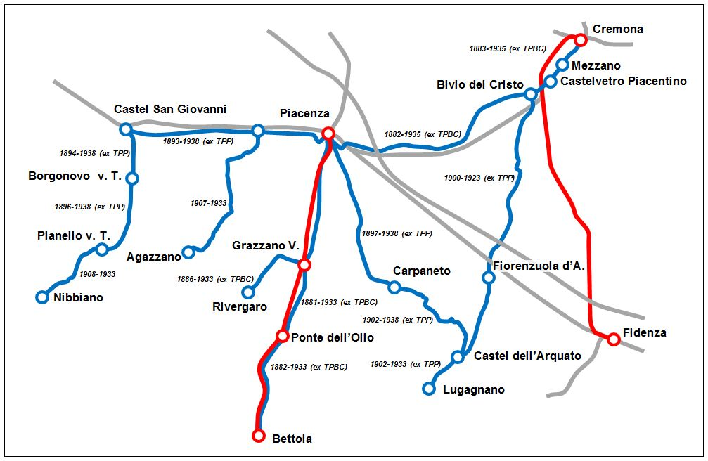 Mappa delle linee ferroviarie (in rosso) e tranviarie (in blu) gestite dalla SIFT.